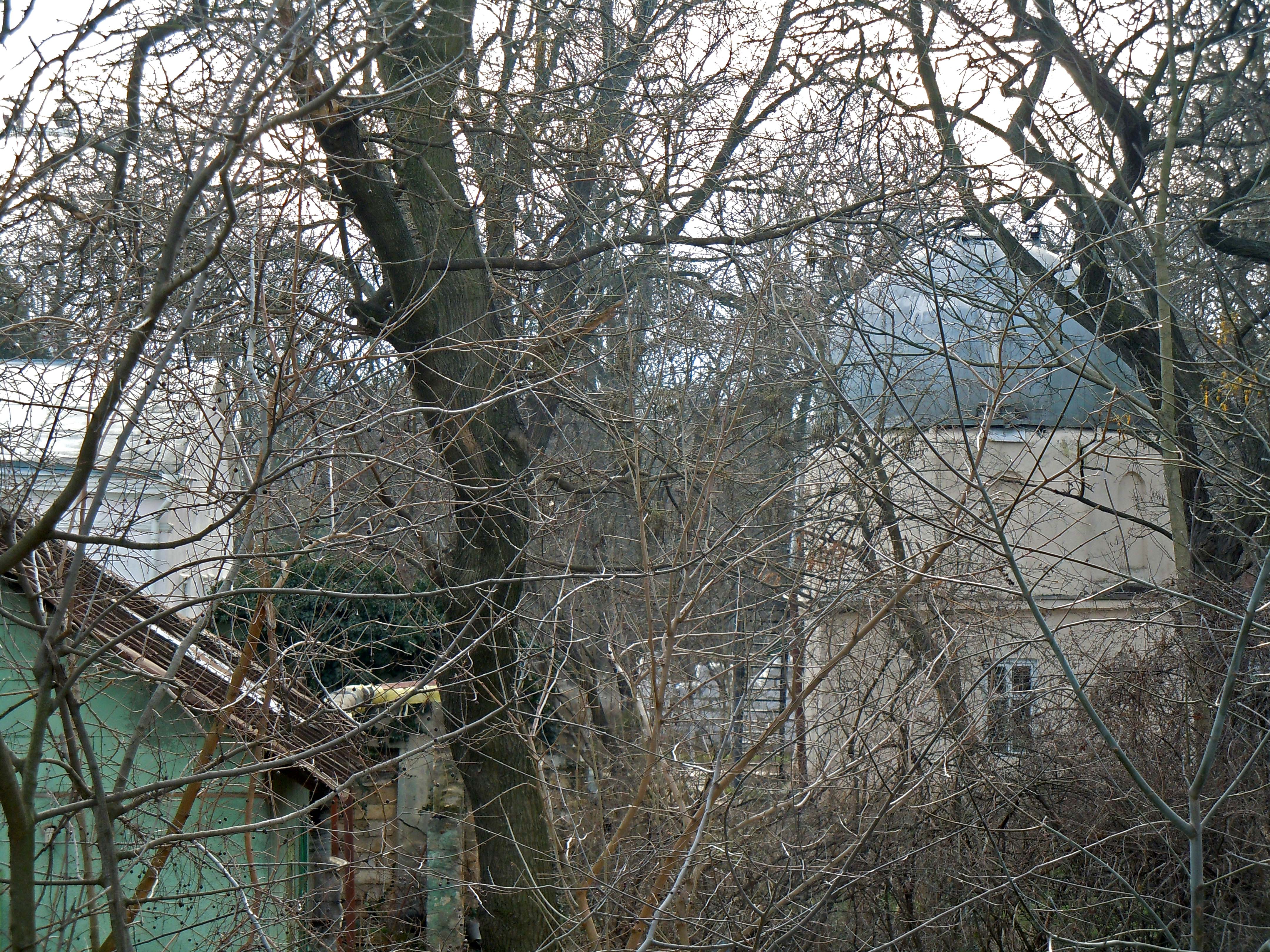 Одеська обсерваторія